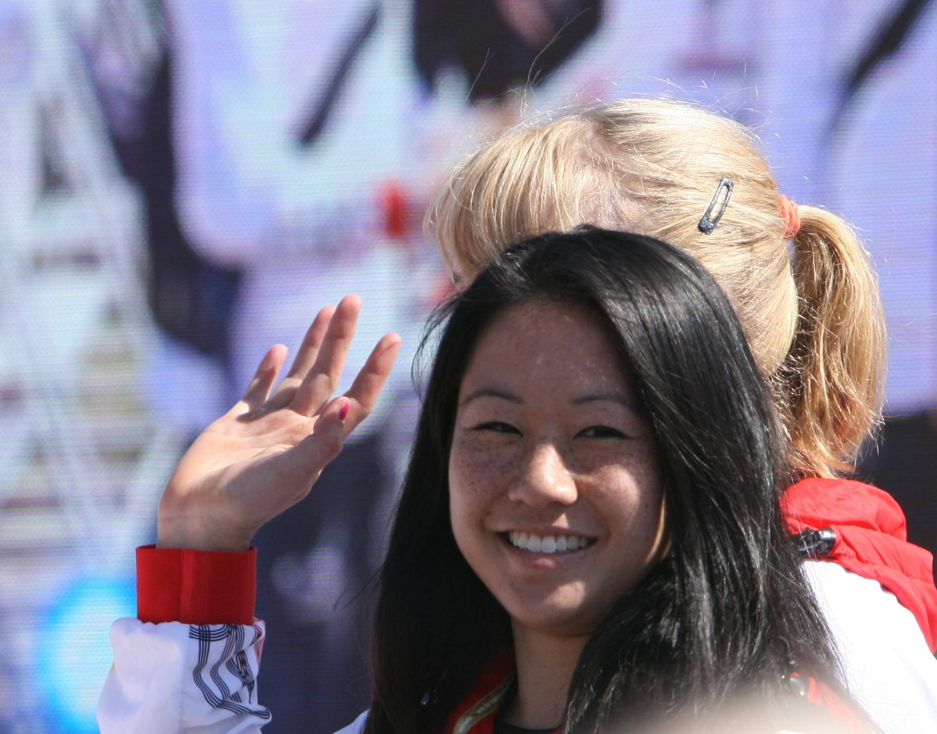 Kim Bui beim Empfang der Olympioniken 2012 in Hamburg